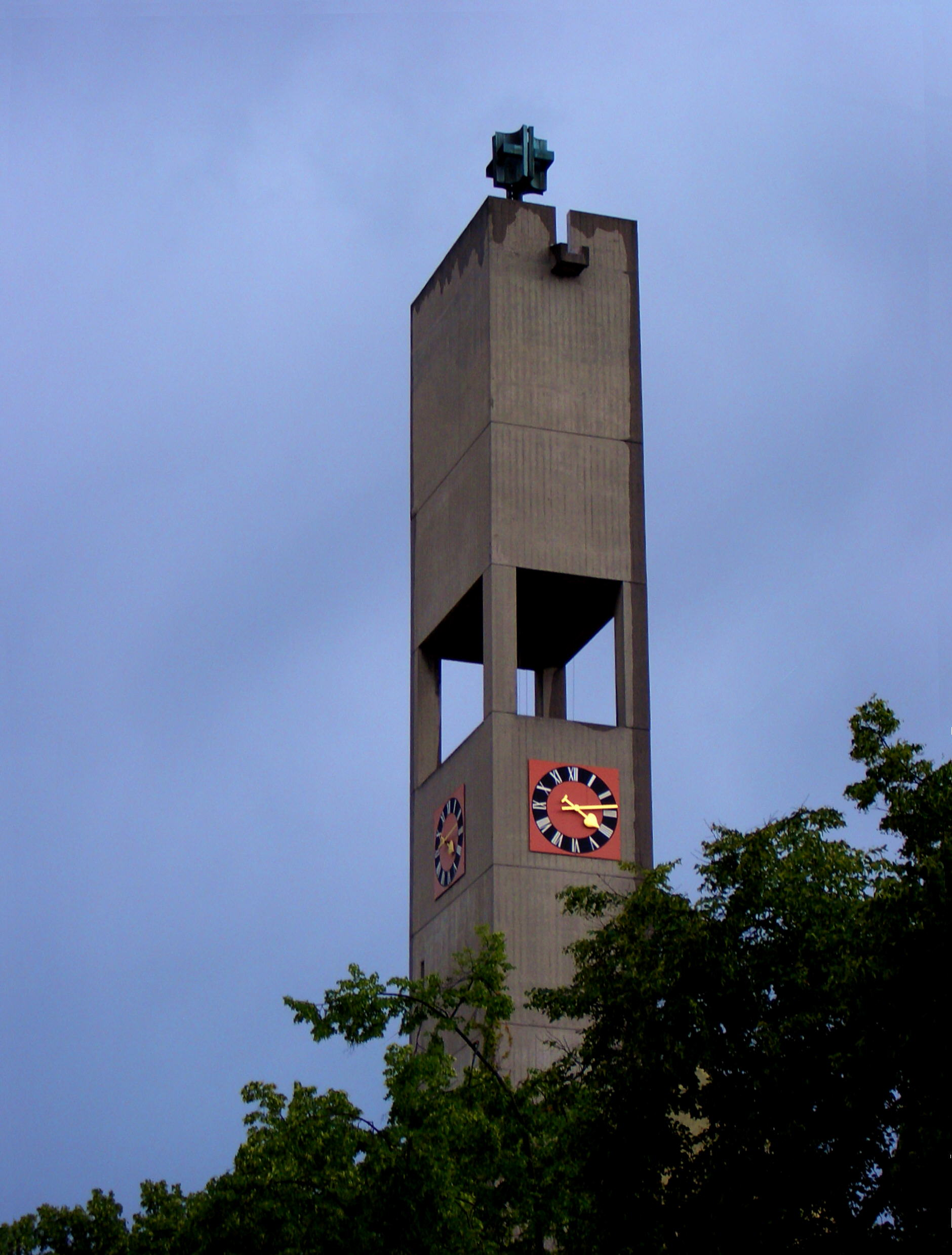 Turm der evangelischen Kreuzkirche München